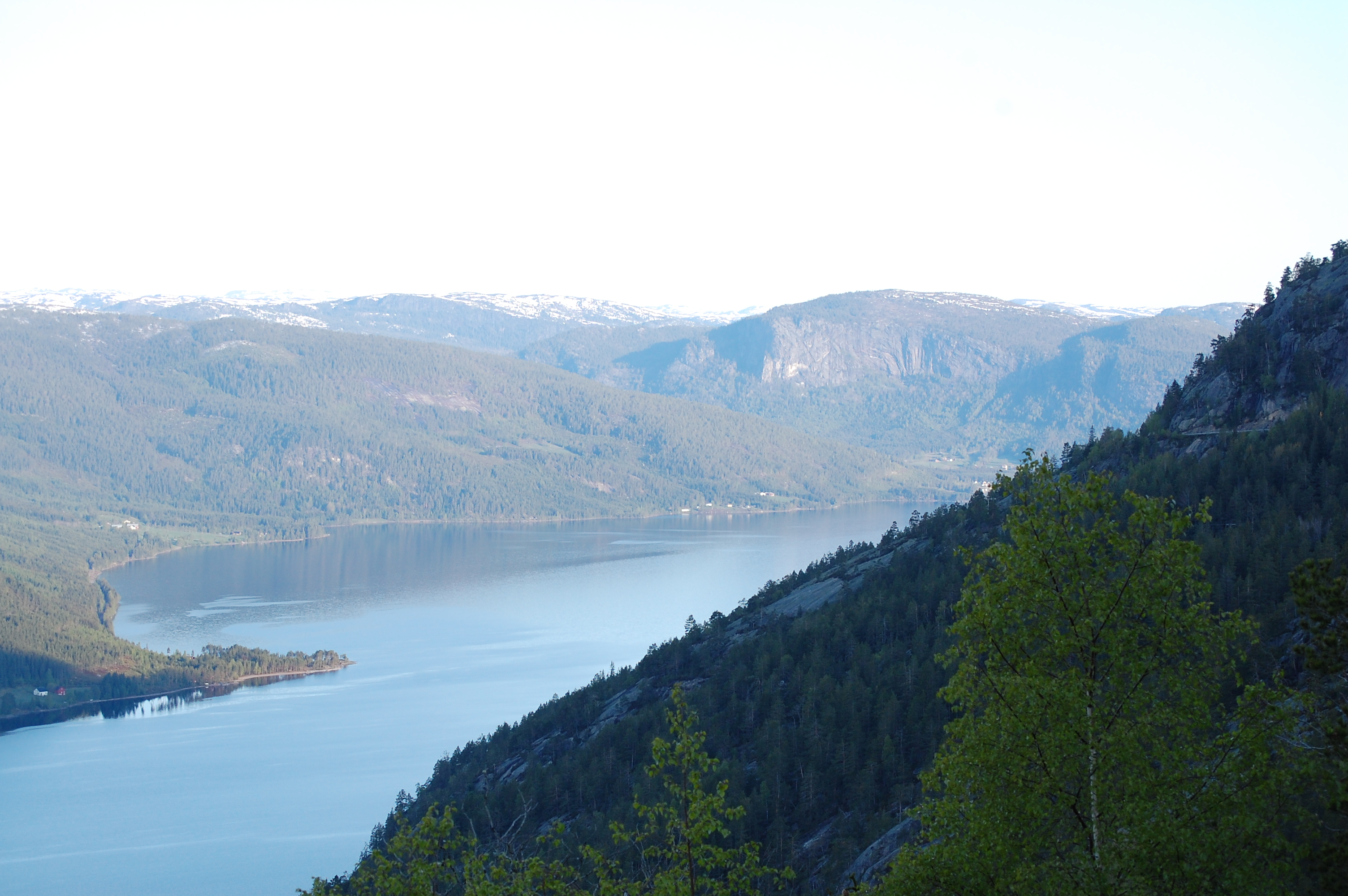 Fyresvatn